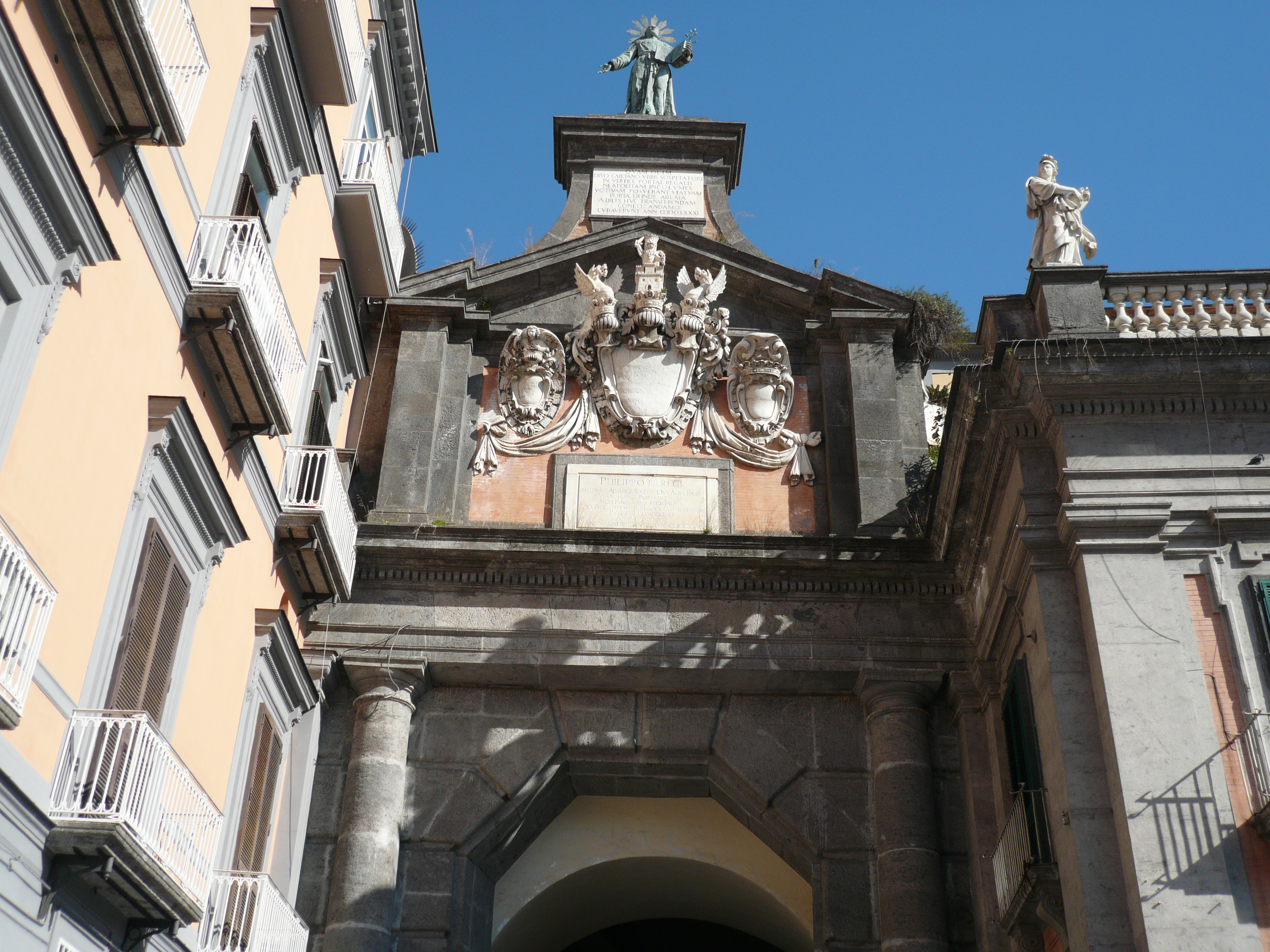 Particolare di Port' Alba. Sulla sommità la statua di San Gaetano